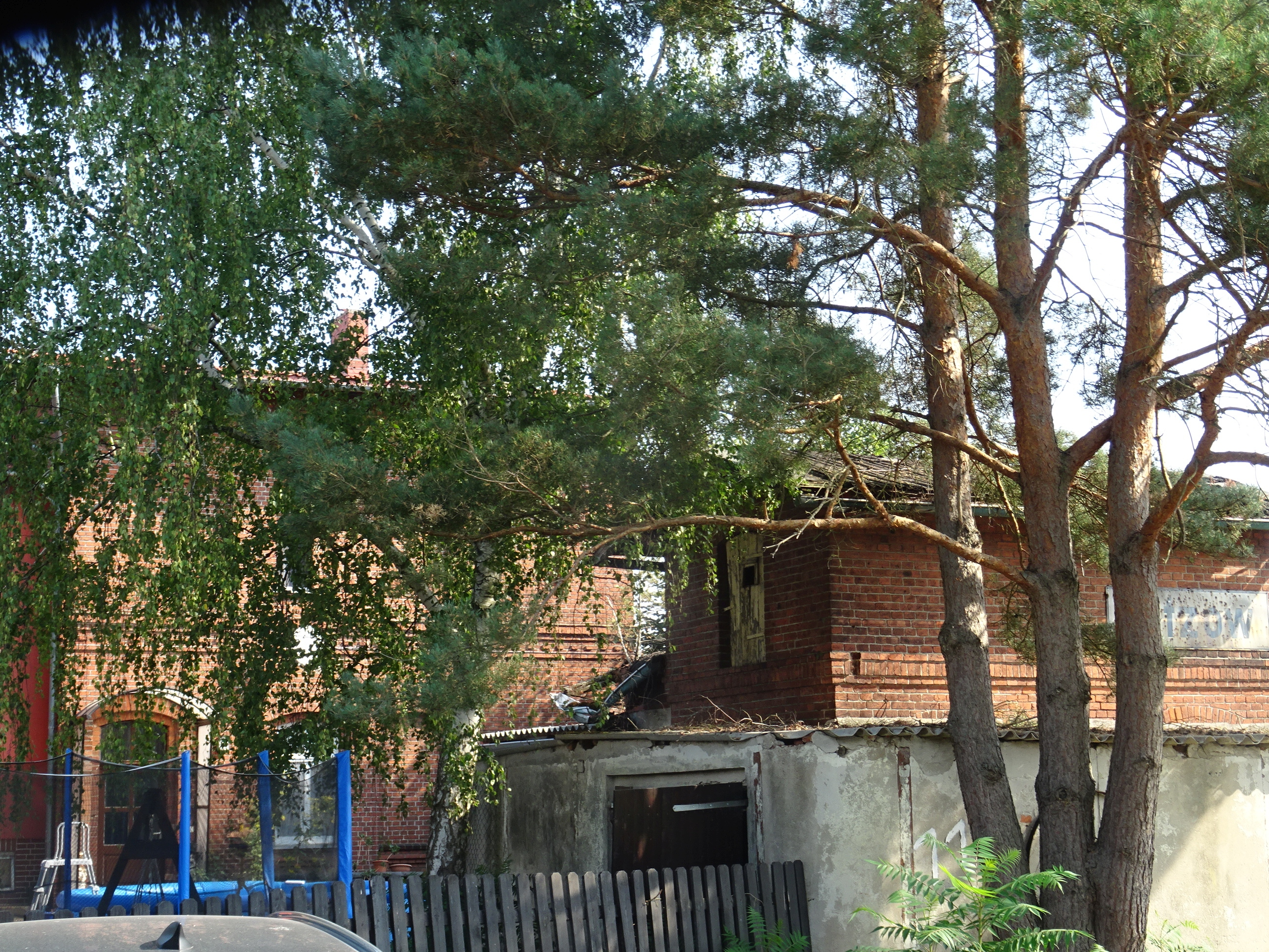 Bahnhof Nitzow, Ansicht der Gebäude von Südwesten